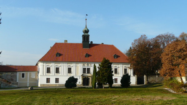 Barokní zámek v Konici